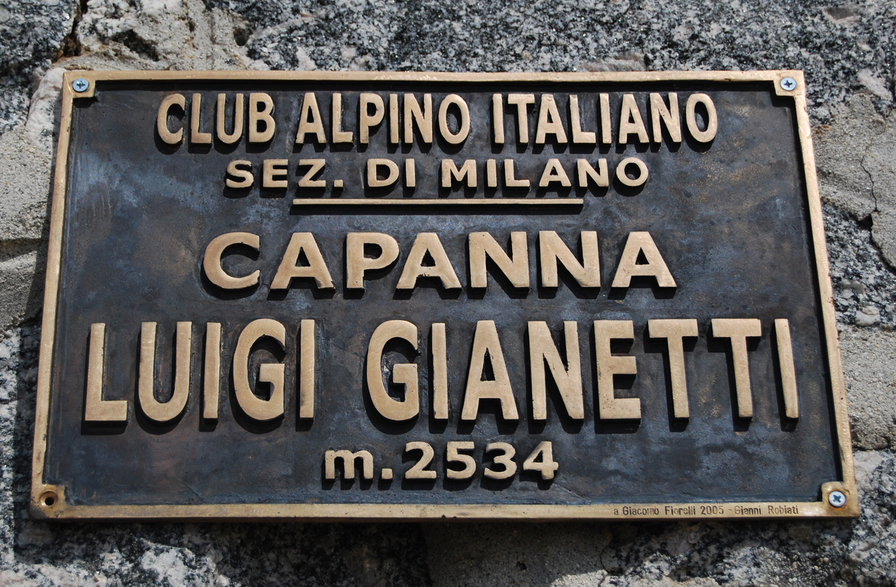 La targa del rifugio